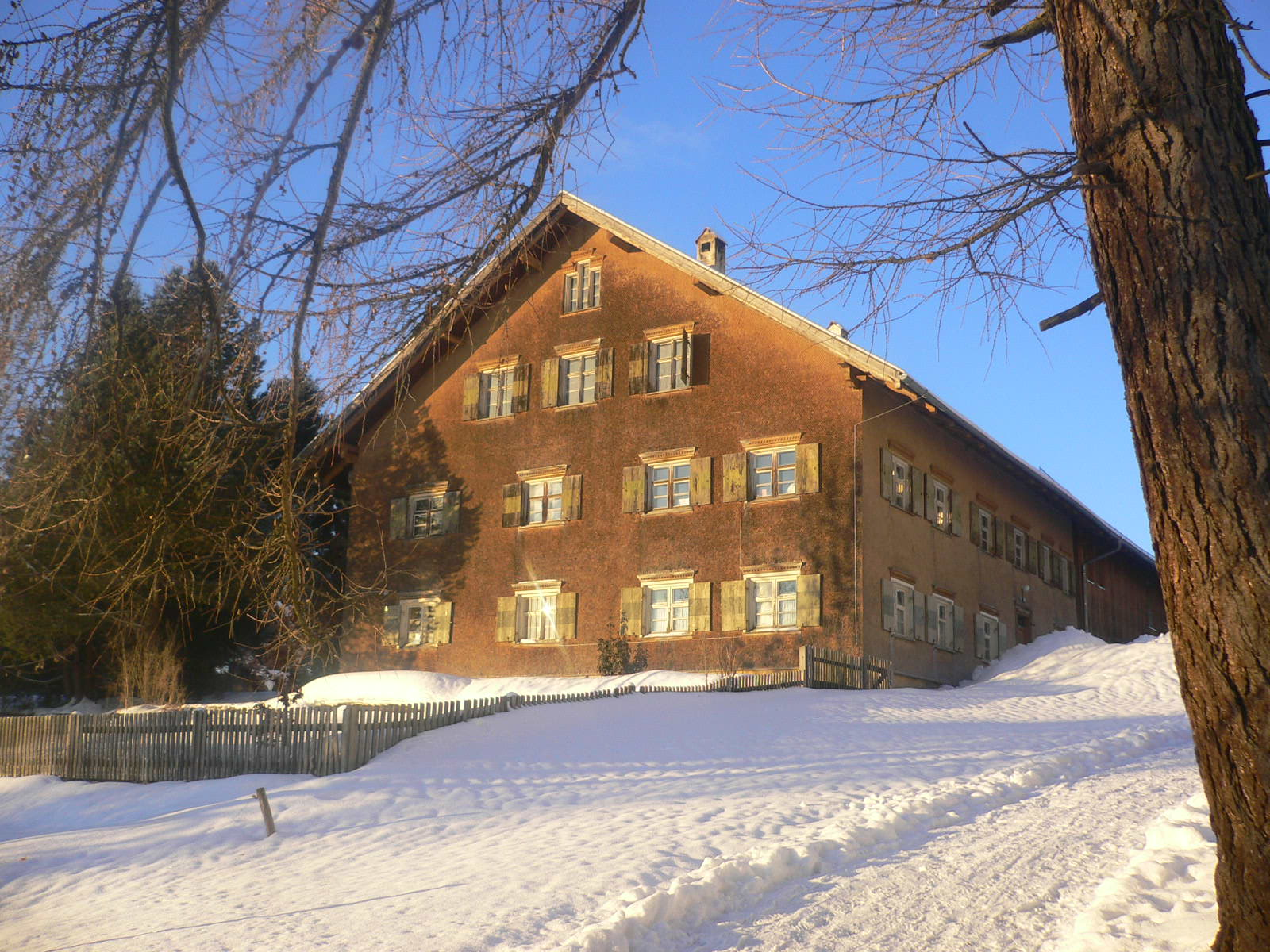 Der denkmalgeschützte Pfarrhof in Maria Rain, Oberallgäu, bis 1989 bewohnt